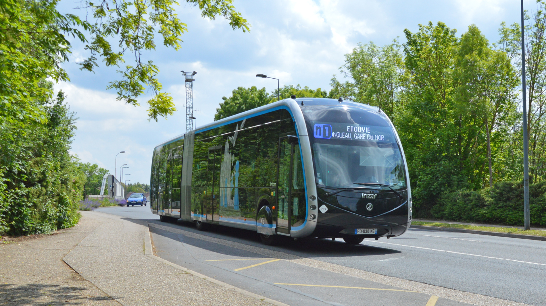 Ametis N1, Irizar Ie Tram, Longueau